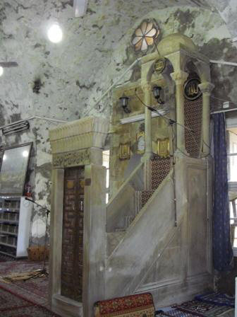 جامع السلطان إبراهيم بن الأدهم في مدينة جبلة الساحلية السورية